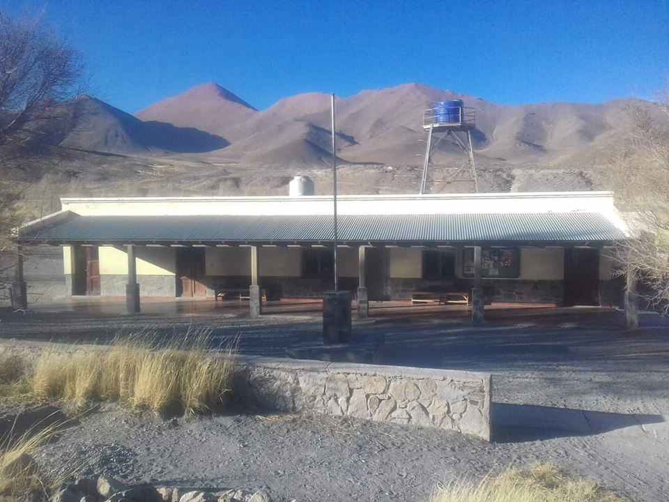 Escuela primaria, construida con materiales de la zona y techo de chapa, cuenta con 33 alumnos provenientes de la zona.edificio